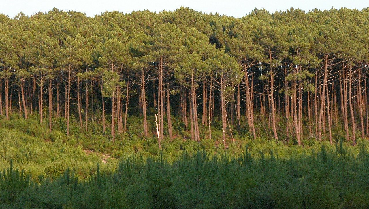 Forêt des Landes (La Teste de Buch), avec Pinus pinaster